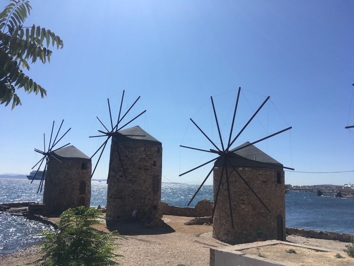 Οι ανεμόμυλοι της Χίου βρίσκονται στο βόρειο τμήμα της πόλης της Χίου, στην περιοχή Ταμπάκικα. Για την τοπική κοινωνία της Χίου είναι ένα μνημείο μεγάλης ιστορικής αξίας.